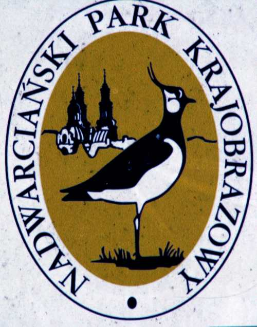 Logo Nadwarciańskiego Parku Krajobrazowego.